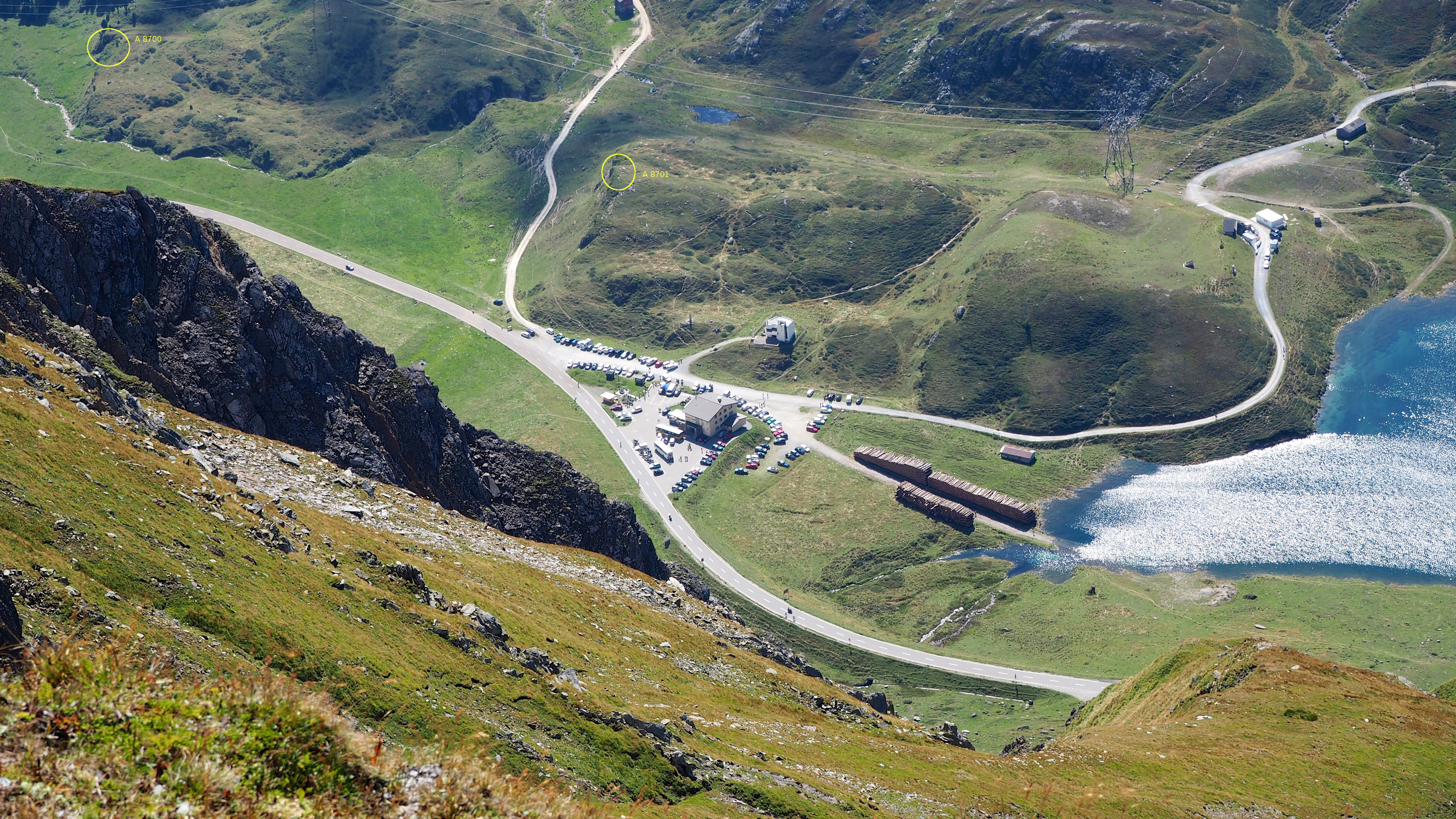 Lukmanier Passhöhe, Tessin, Schweiz: Bunker A8700 A8701